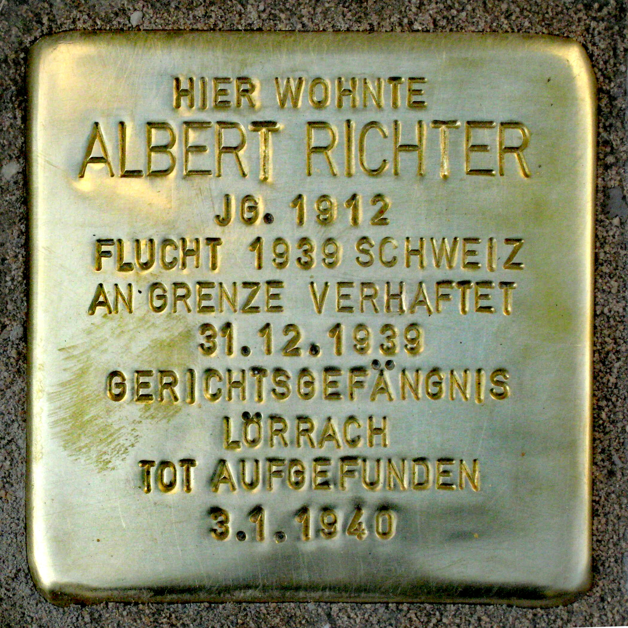 Stolperstein für Albert Richter (Radrennfahrer), Sömmeringstr. 70, Köln-Ehrenfeld